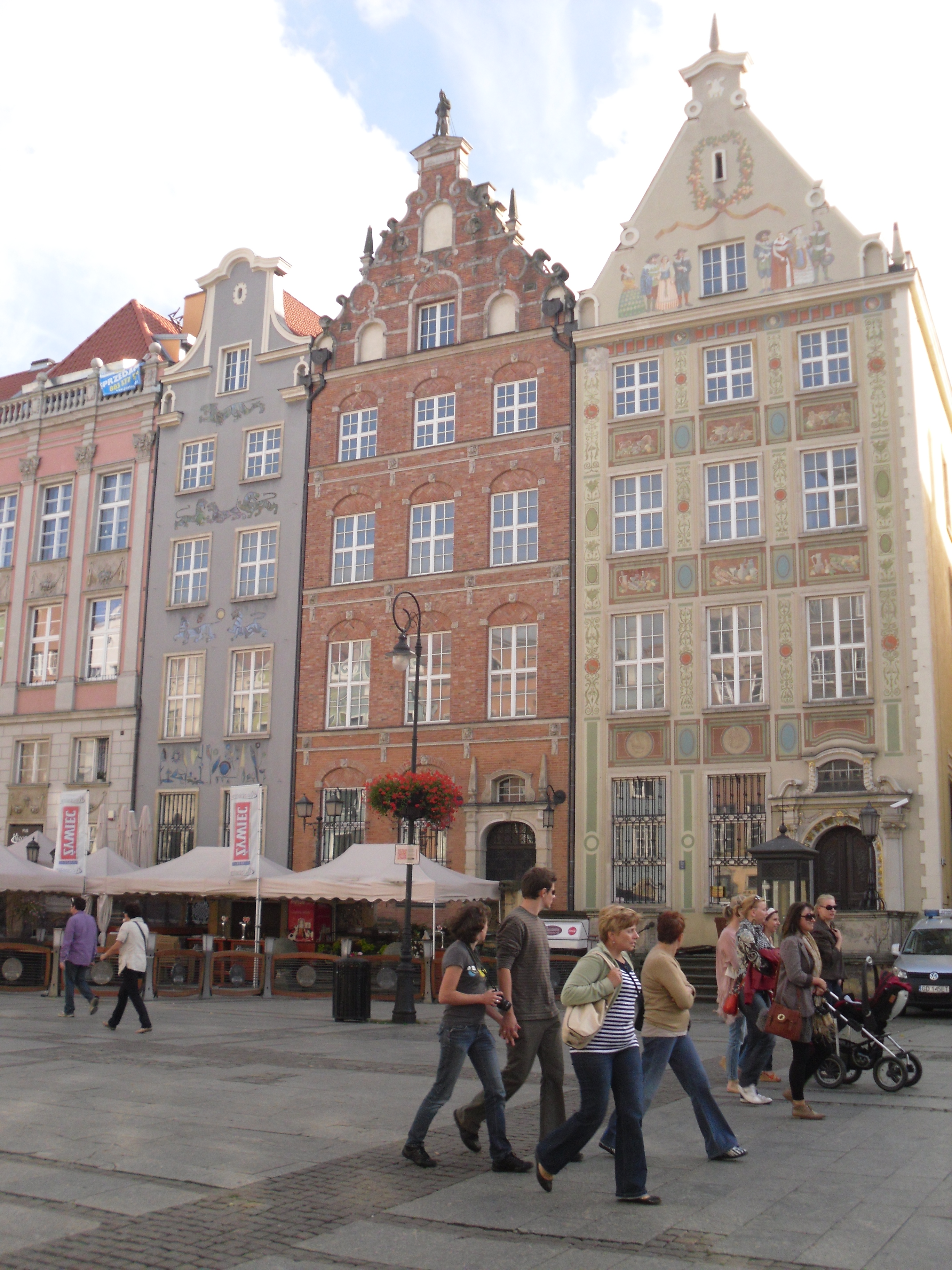 Gdańsk Główne Miasto - kamienice przy Długim Targu, od lewej 17 (fragment), 16, 15 i 14